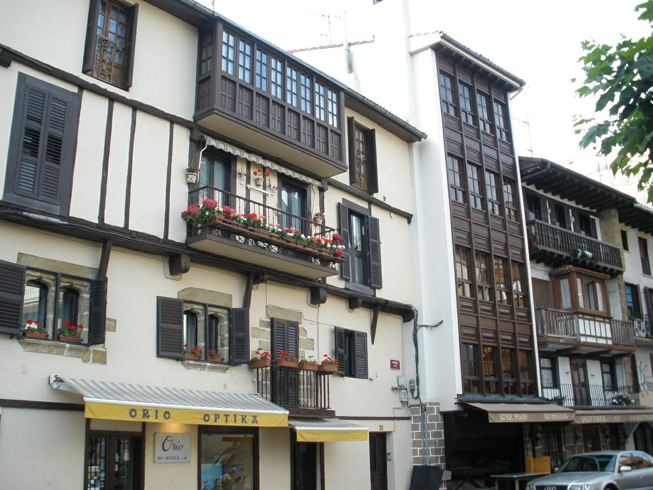 Orio (Gipuzkoa)